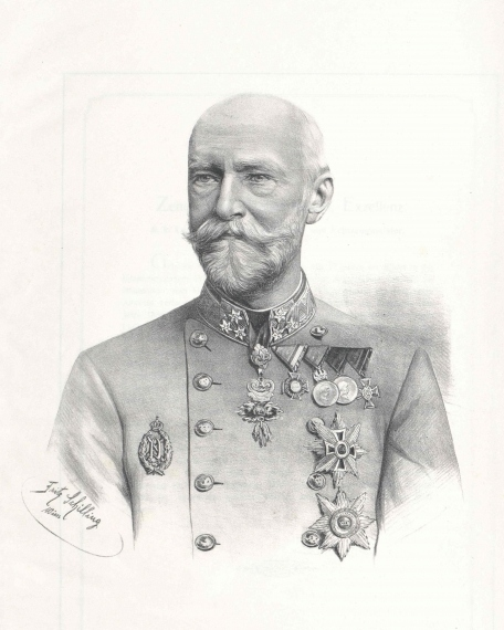 Zeno Welsersheimb (1835–1921)